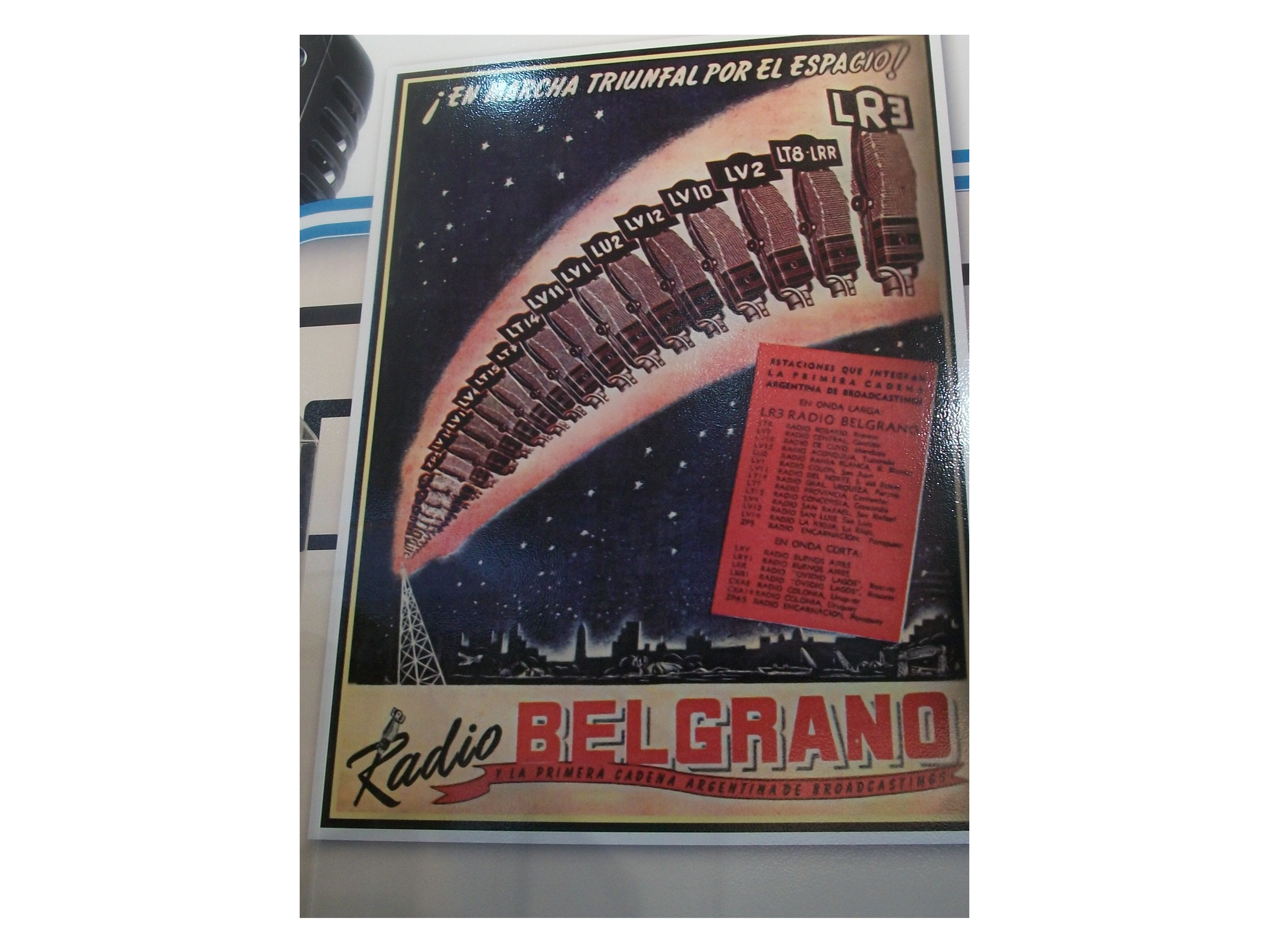 Antiguo cartel de Radio Belgrano-stand de la Presidencia de la Nación Argentina en la Bicexpo 2010